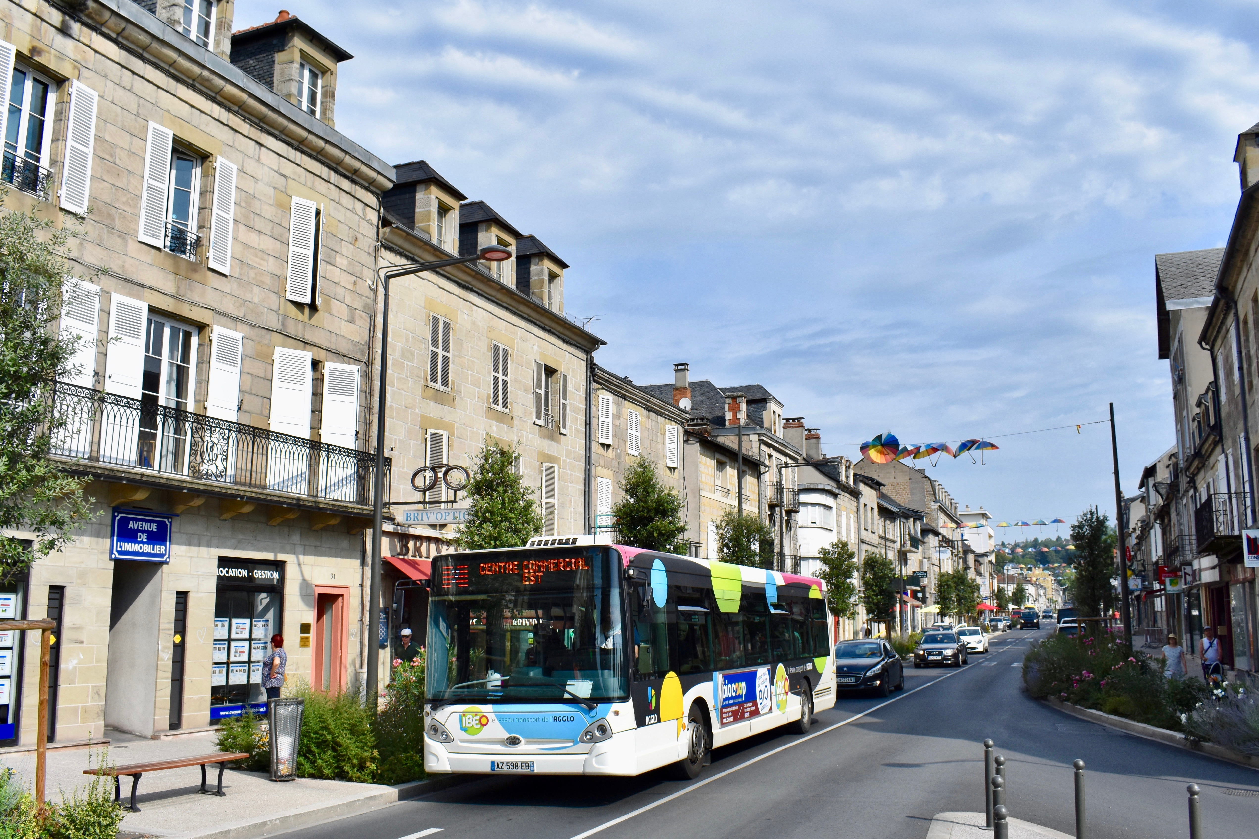 Véhicule du réseau Libeo de Brive-la-Gaillarde en Corrèze assurant sa mission sur la ligne 2.